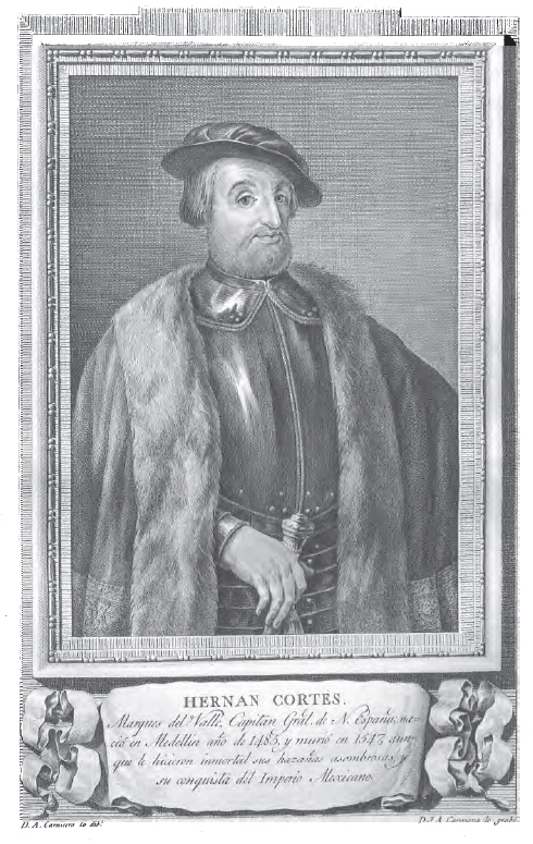 Retrato de Hernán Cortés.